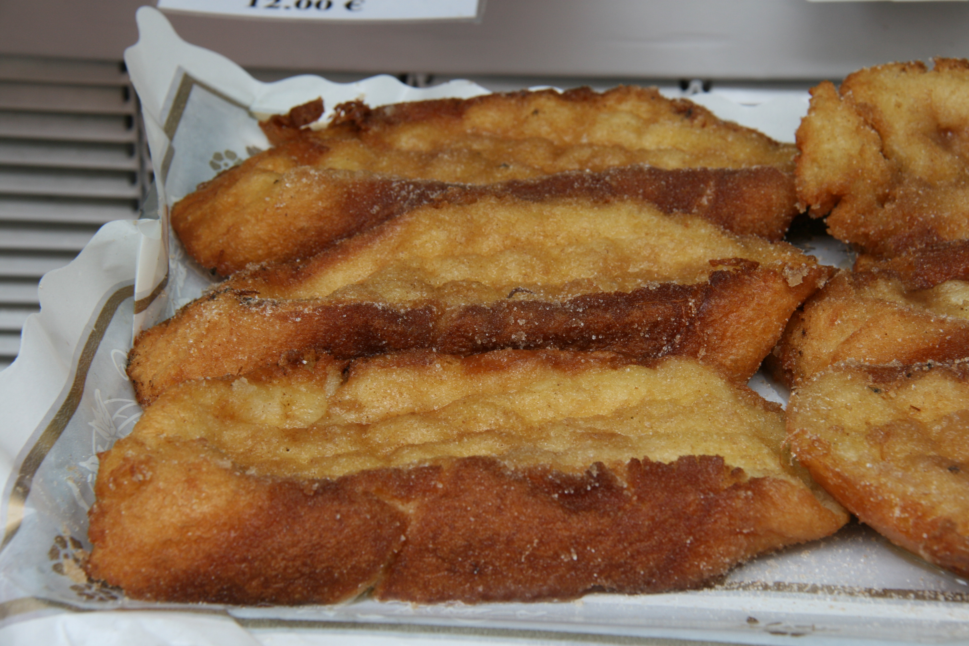 Torrijas en la Mallorquina